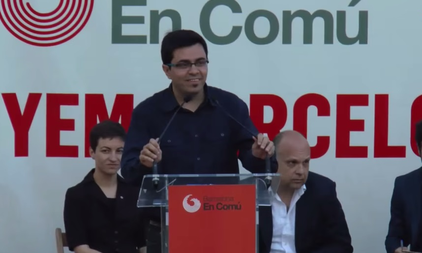 Gerardo Pisarello en un acto de Barcelona en Comú.